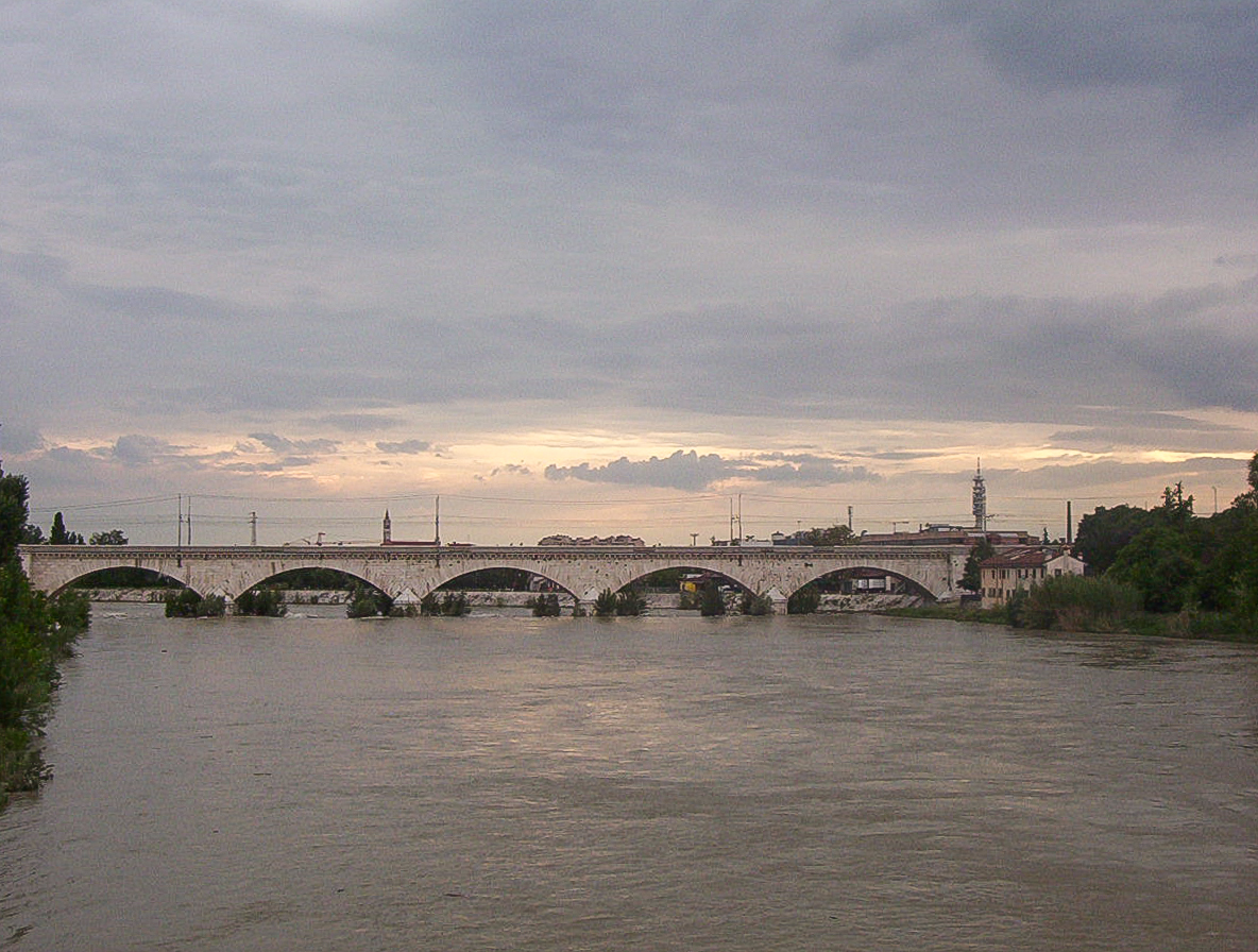 Ponte della ferrovia a Verona